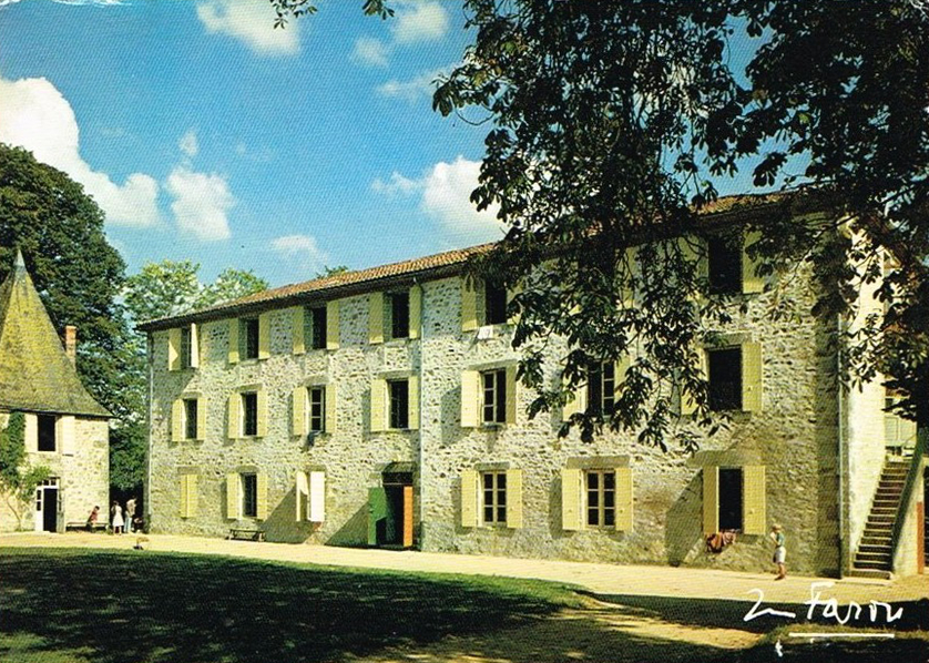 Les Salles Lavauguyon ( Haute-Vienne) Colonie de vacances du Chêne Vert achetée par la Mairie de Villetaneuse en 1951